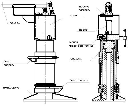 Домкрат путевой гидравлический ДПГ-20-200